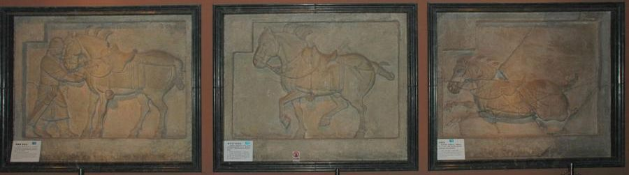 西安碑林中的昭陵六骏－飒露紫（复制品）-拳毛騧（复制品）-白蹄乌